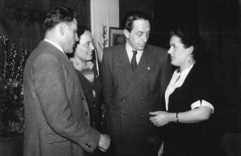 Zentralbild-Illus-Heilig- 27.1.51 - Abschlussprotokoll über die Oder-Neiße Grenze unterzeichnet. Am 27. Januar 1951 unterzeichneten der Leiter des polnischen Aussenministeriums Skrzeszweski und Aussenminister in Frankfurt-Oder das Abschlussprotokoll der Grenzmarkierung der Oder-Neiße-Friedensgrenze. Damit ist die Freidensgrenze zwischen der Republik Polen und der DDR endgülitg festgelegt. UBz: Der Oberbürgermeister von Frankfurt-Oder Hintze im Gespräch mit polnischen Aktivisten.